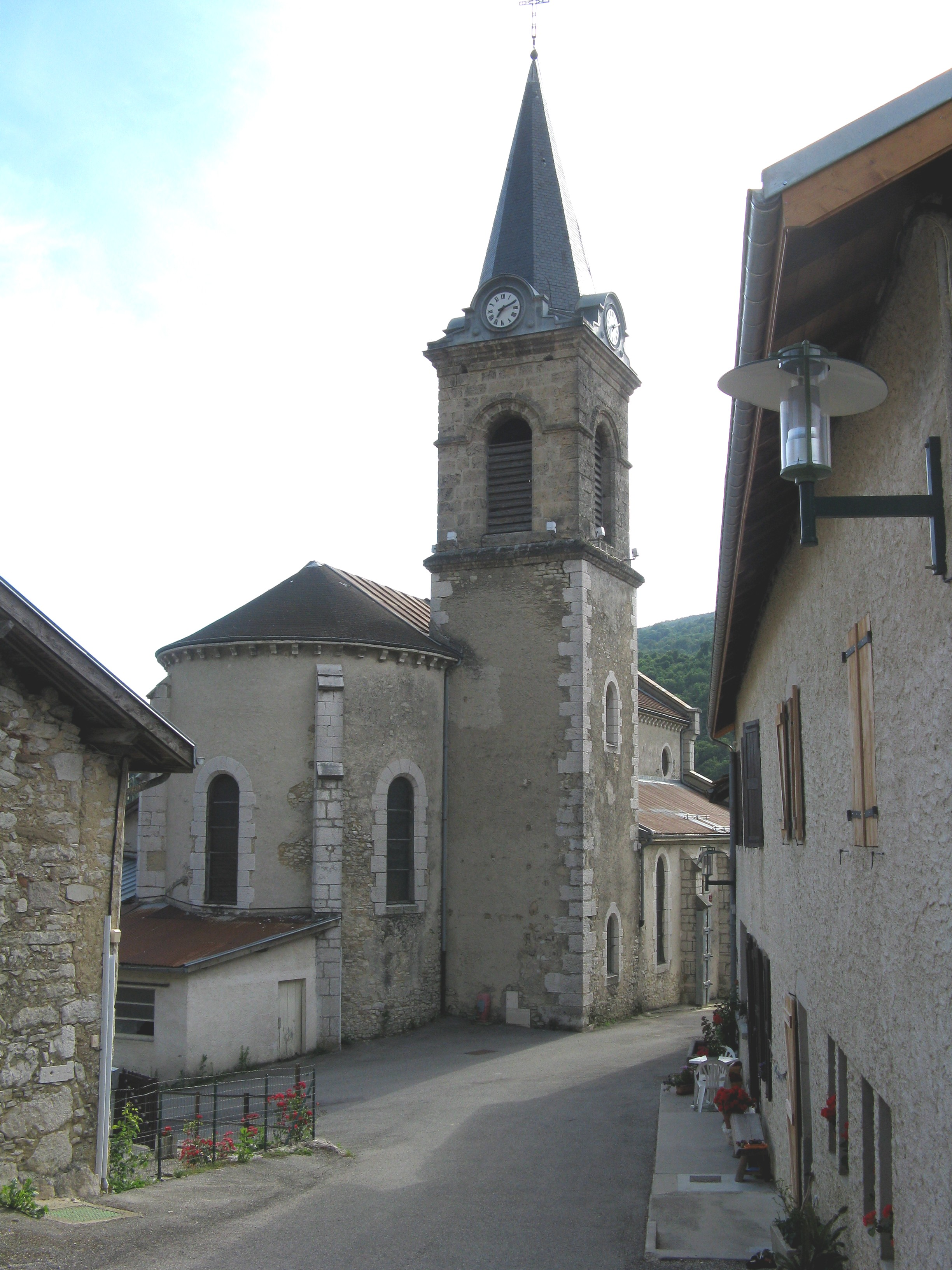 Rencurel - Eglise